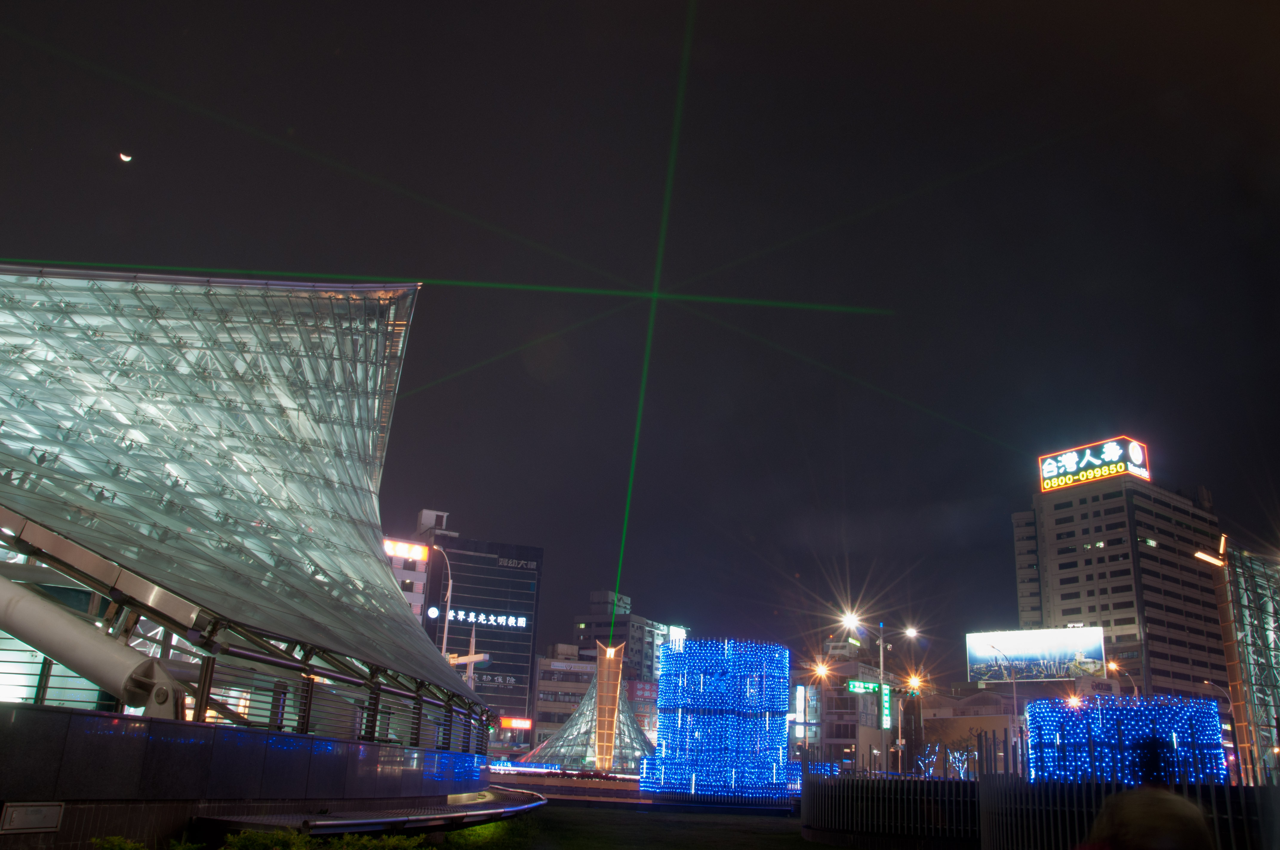 高捷美麗島站雷射